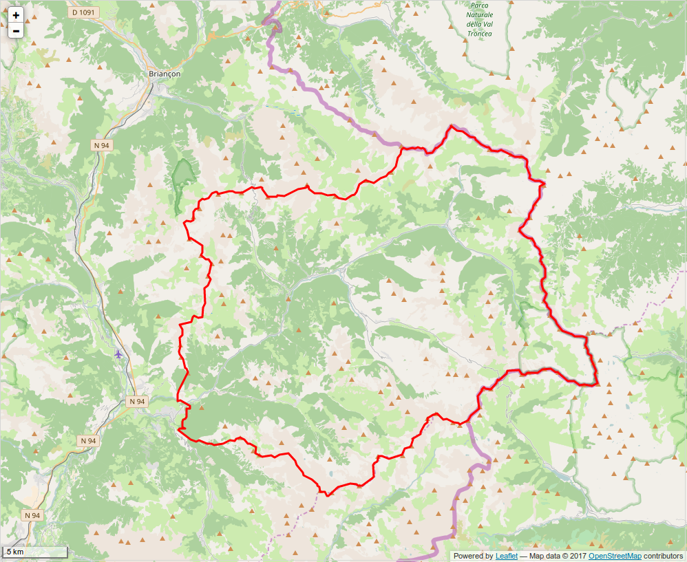 Périmètre du PNR du Queyras.